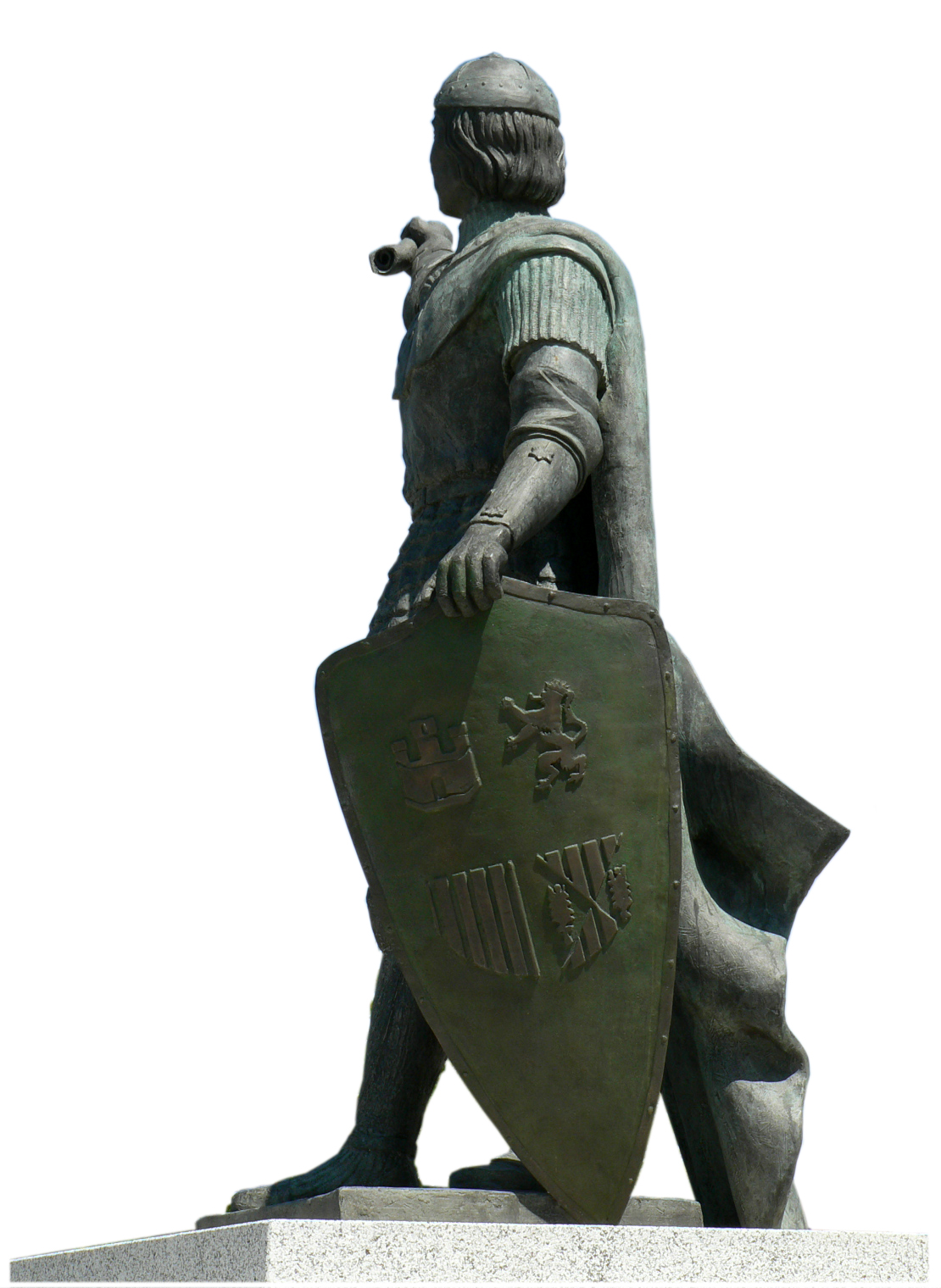 Estatua en bronce de Gonzalo Chacón (1429 – 1507), politico e historiador español. Fué contador de la princesa Isabel de Castilla.